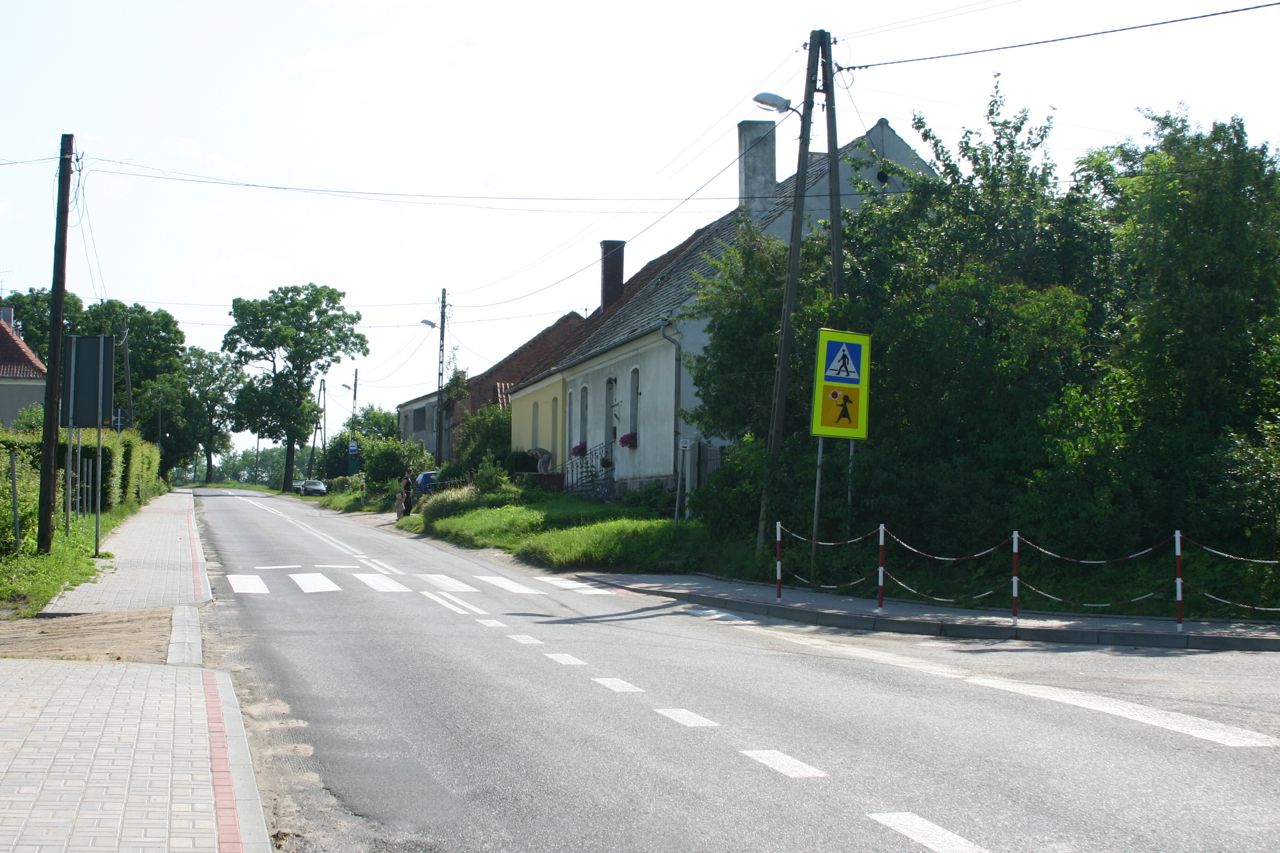 Biedaszki, Polska, powiat kętrzyński.